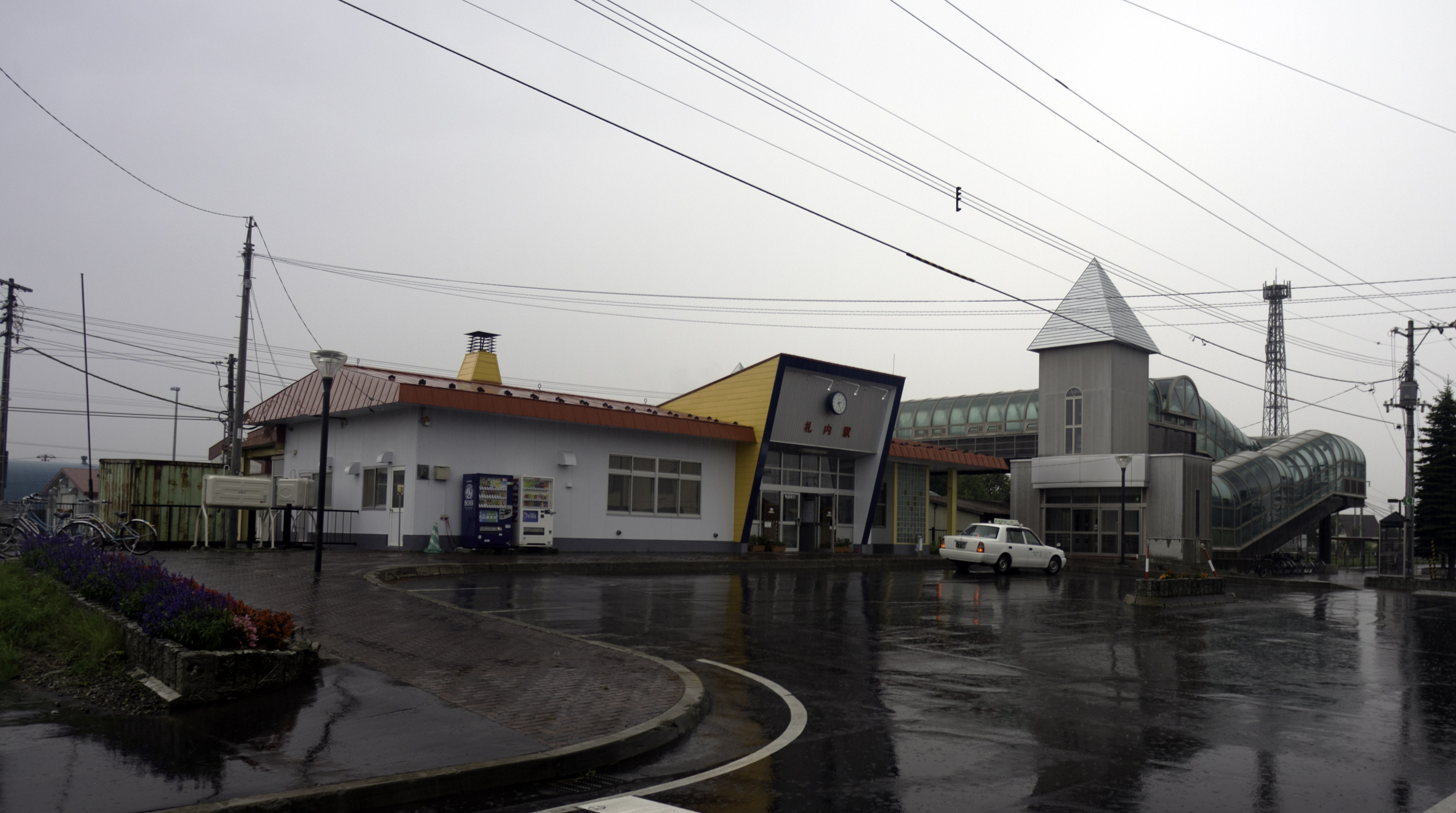 北海道旅客鉄道根室本線札内駅駅舎